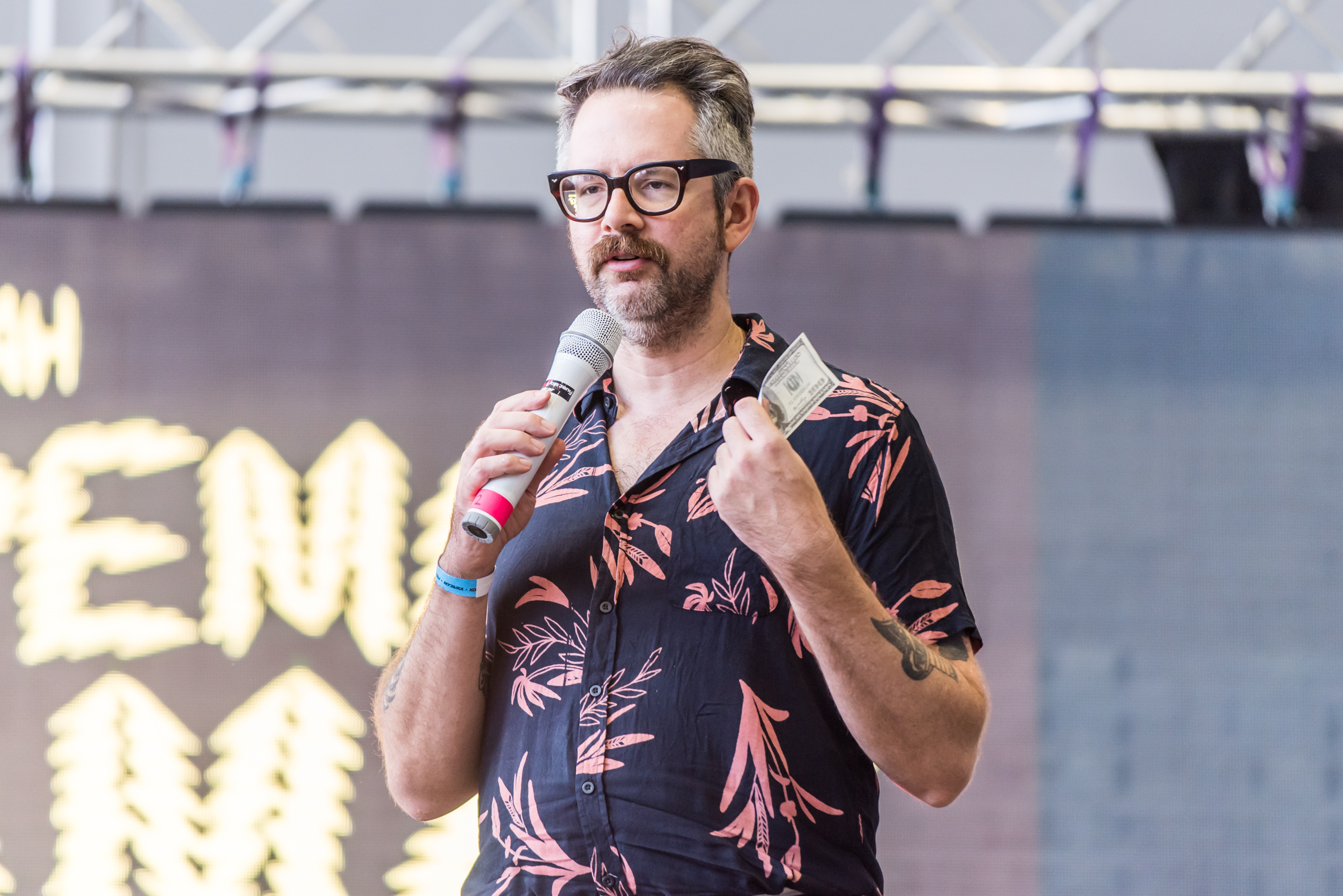 Джонни Райан на Бигфест 2018